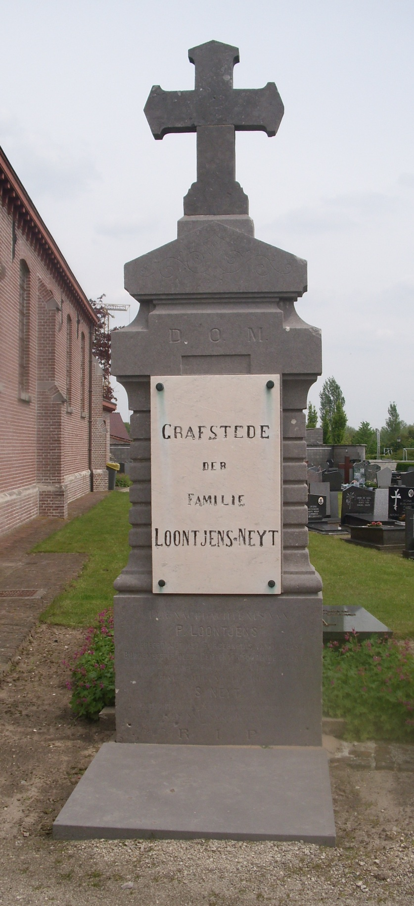 Grafsteen Petrus Loontjens en echtgenote Sophie Neyt - begraafplaats Oostwinkel - Zomergem - Oost-Vlaanderen - België